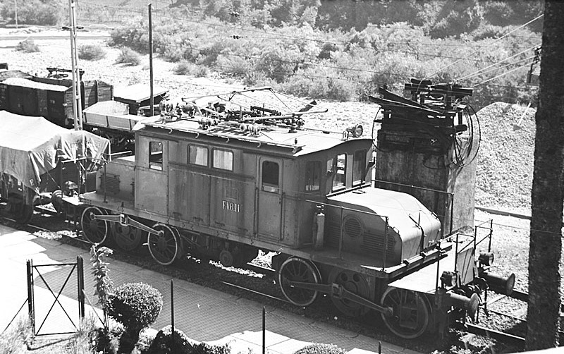 Locomotiva 11 della Ferrovia Valle Brembana in sosta a Villa d’Almè.